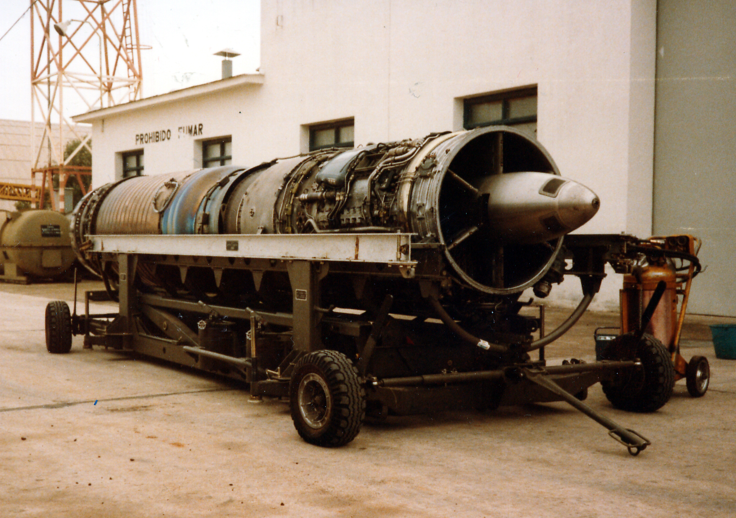 Turborreactor.